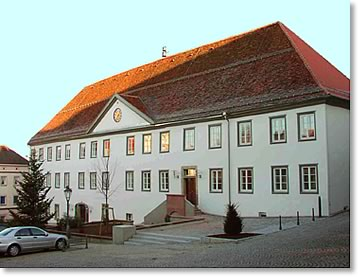 Altes Schloss Hechingen. Baden-Württemberg, Germany.